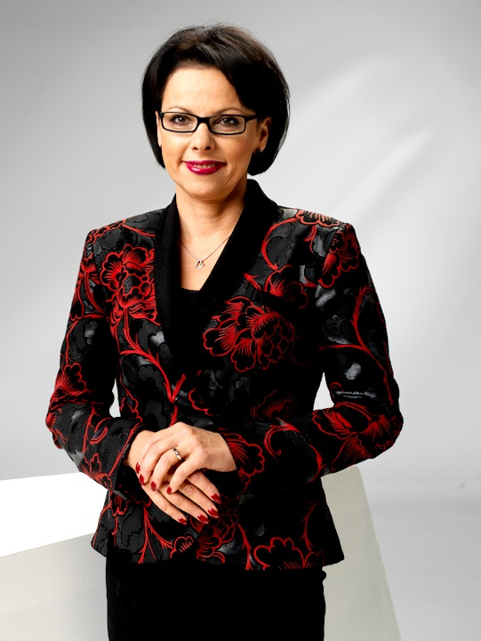 Posłanka do Parlamentu Europejskiego Małgorzata Handzlik